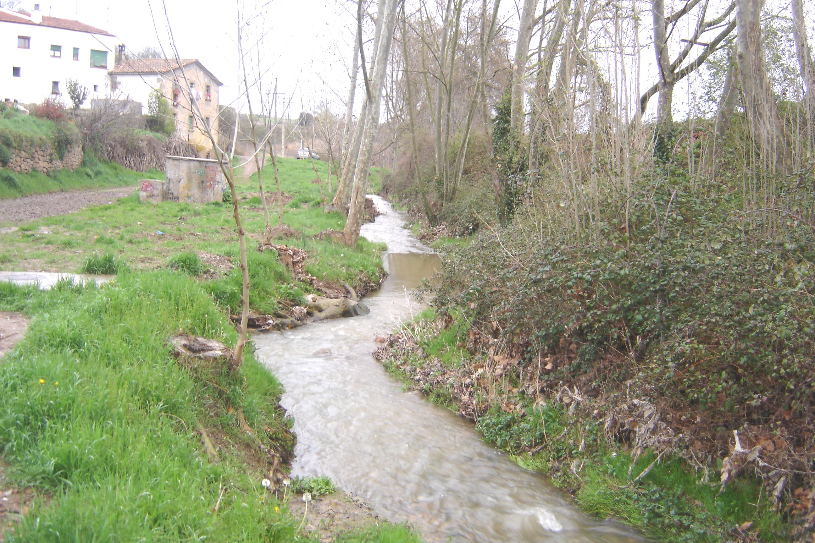 La font i i la casa del Molí dels Capellans a la vora del riu Negre, a Solsona (Solsonès)